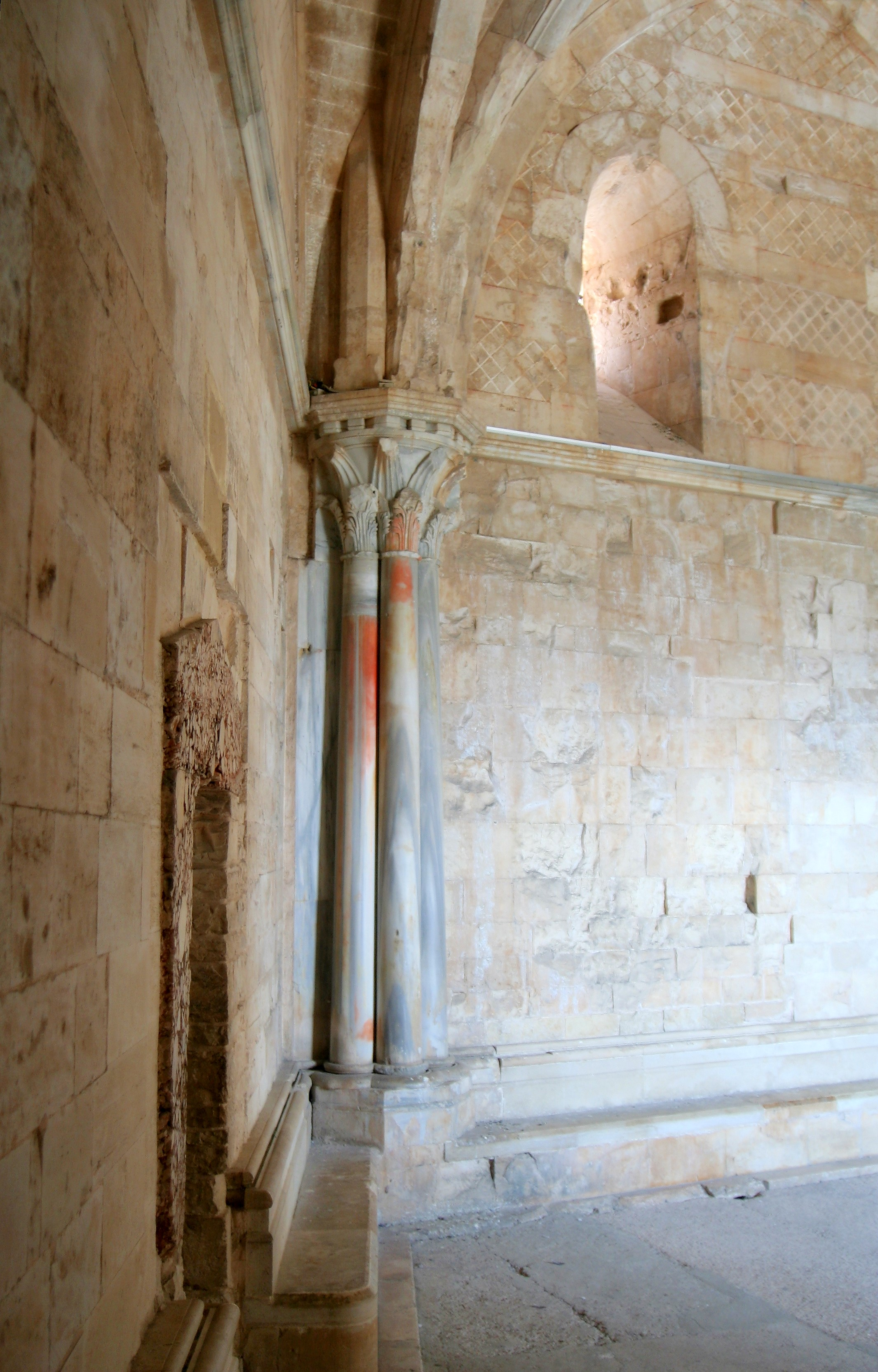 Inside of Castel del Monte